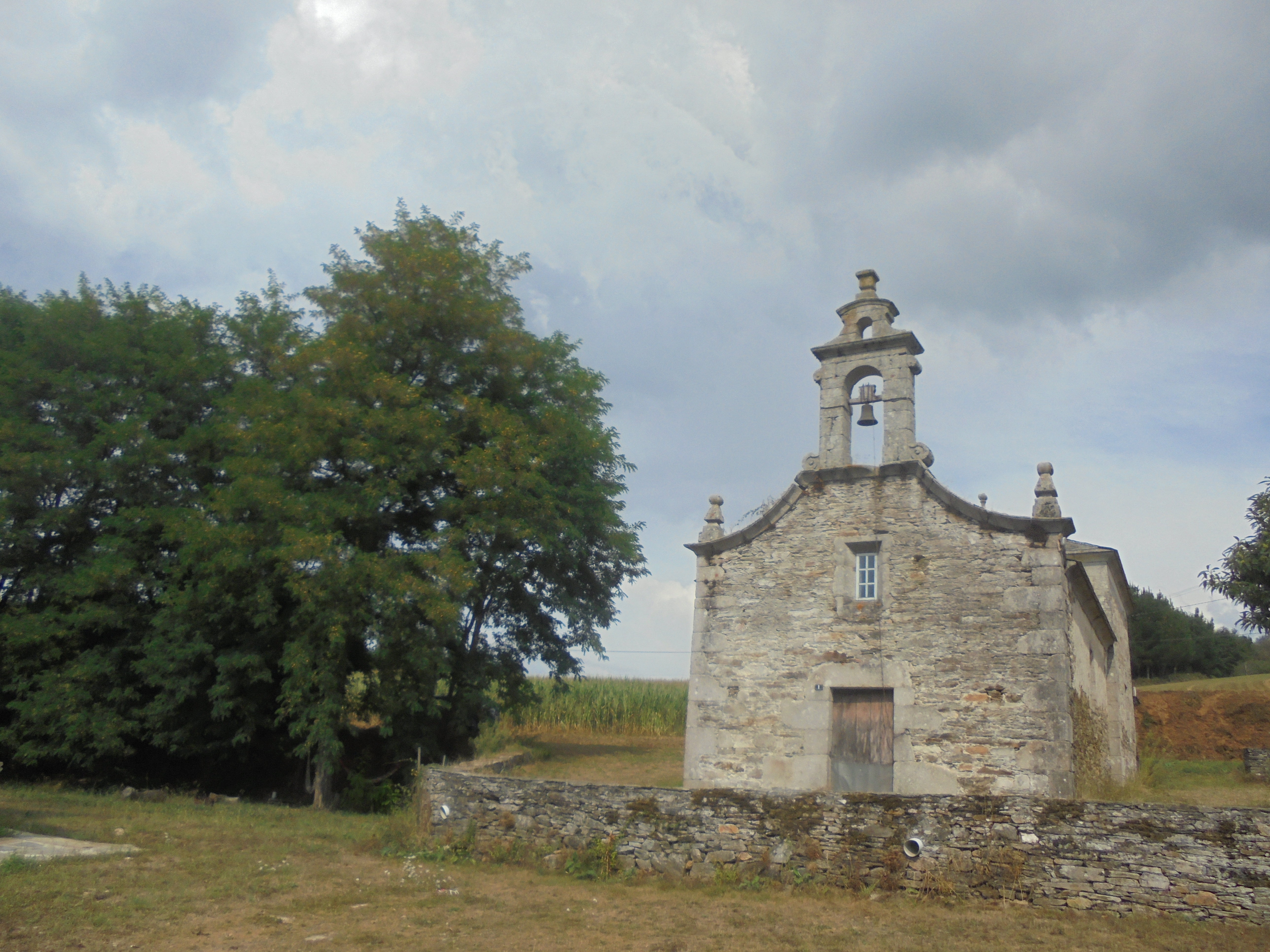 Igrexa parroquial de Lea ( Pol )